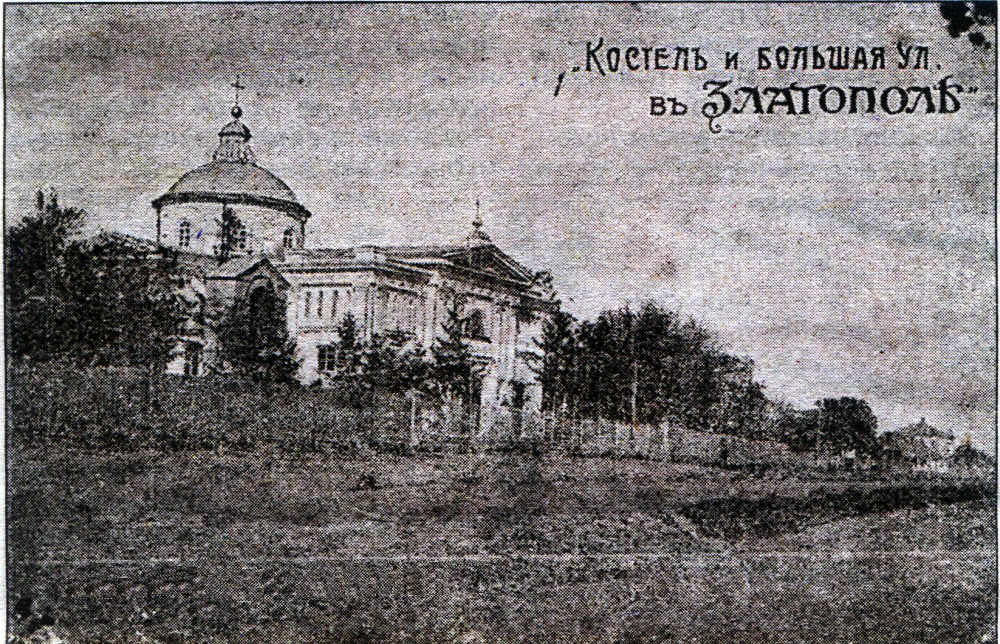 Костел у Златополі: Костел та Велика вулиця у Златополі (нині у складі Новомиргорода Кіровоградської області)